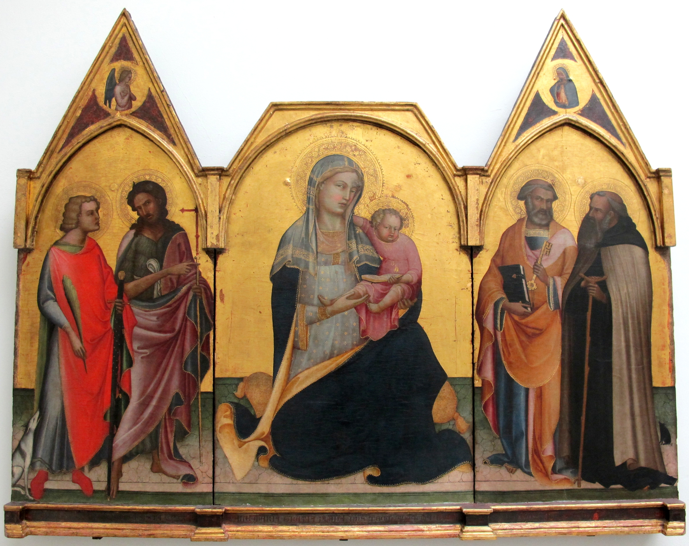 Lorenzo monaco, madonna dell'umiltà e santi, da s. donnino